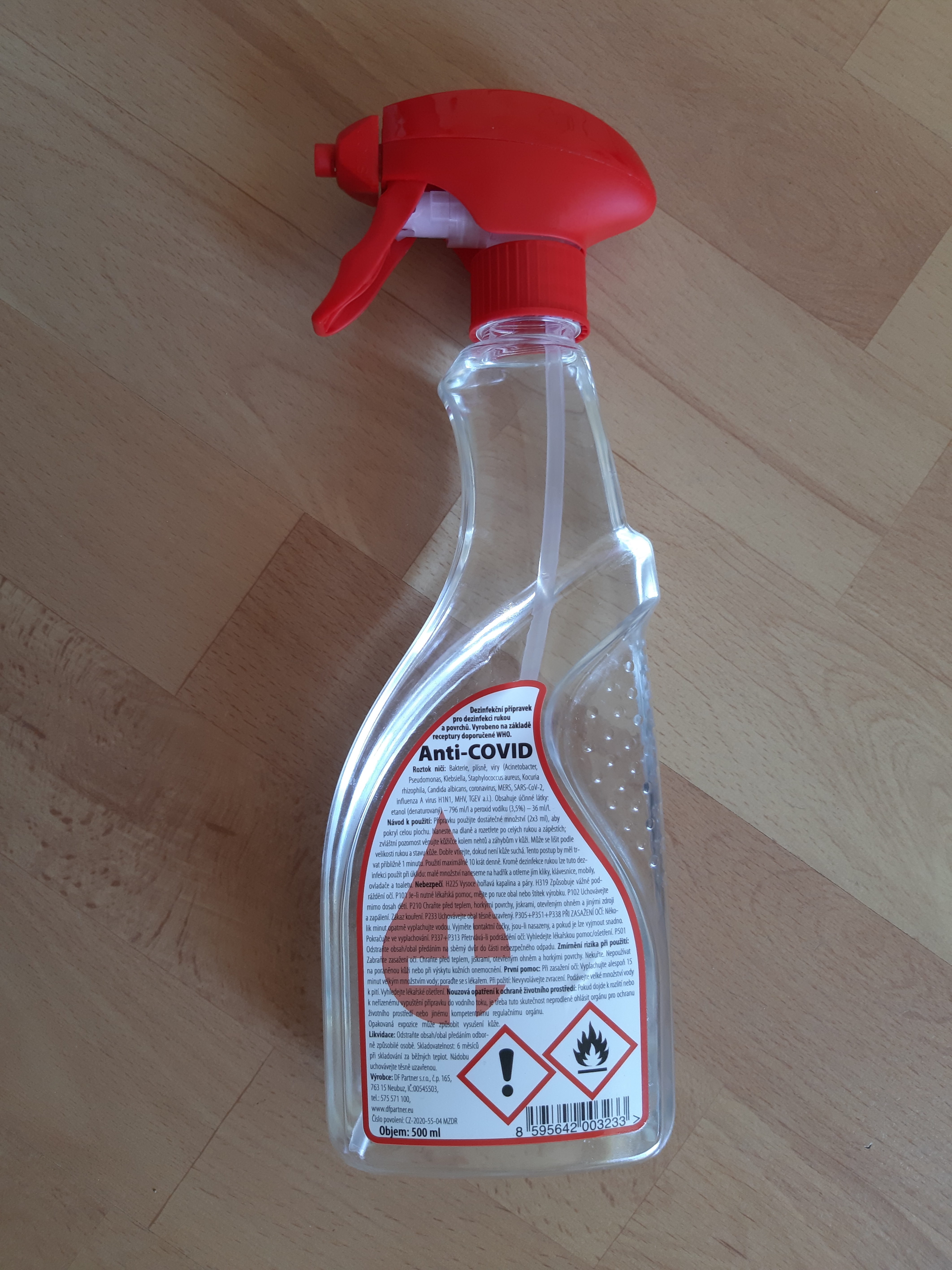 K-vir: Speciální "ANTI-covid" dezinfekce na ruce.)